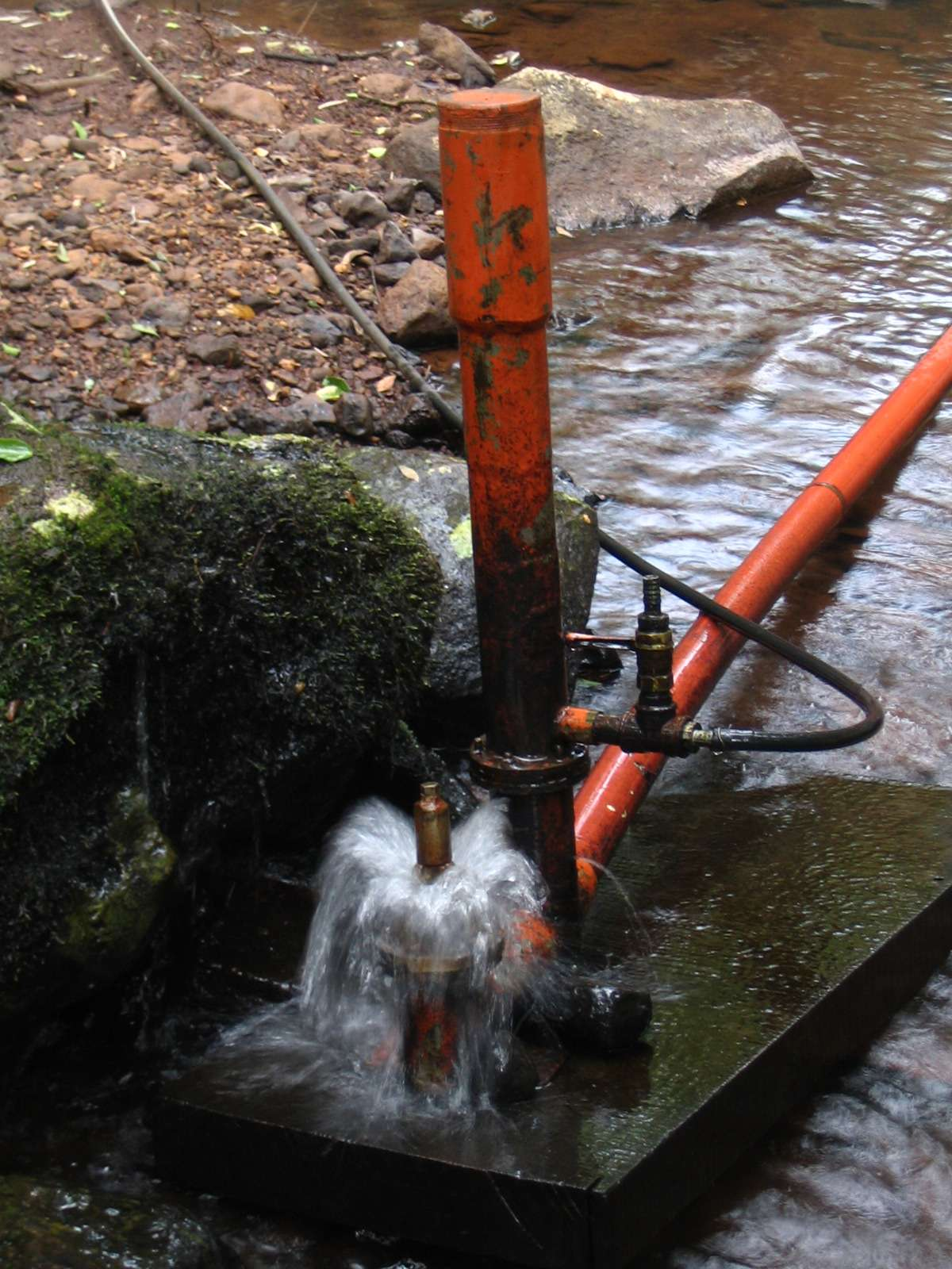 Foto de un ariete hidráulico funcionando en un arroyo del monte misionero en la localidad de Oberá, Misiones, Argentina.